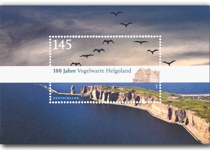 Blockausgaben